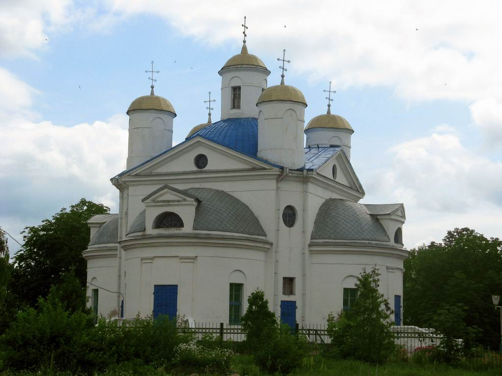 Беларуская (тарашкевіца): Стрэшын